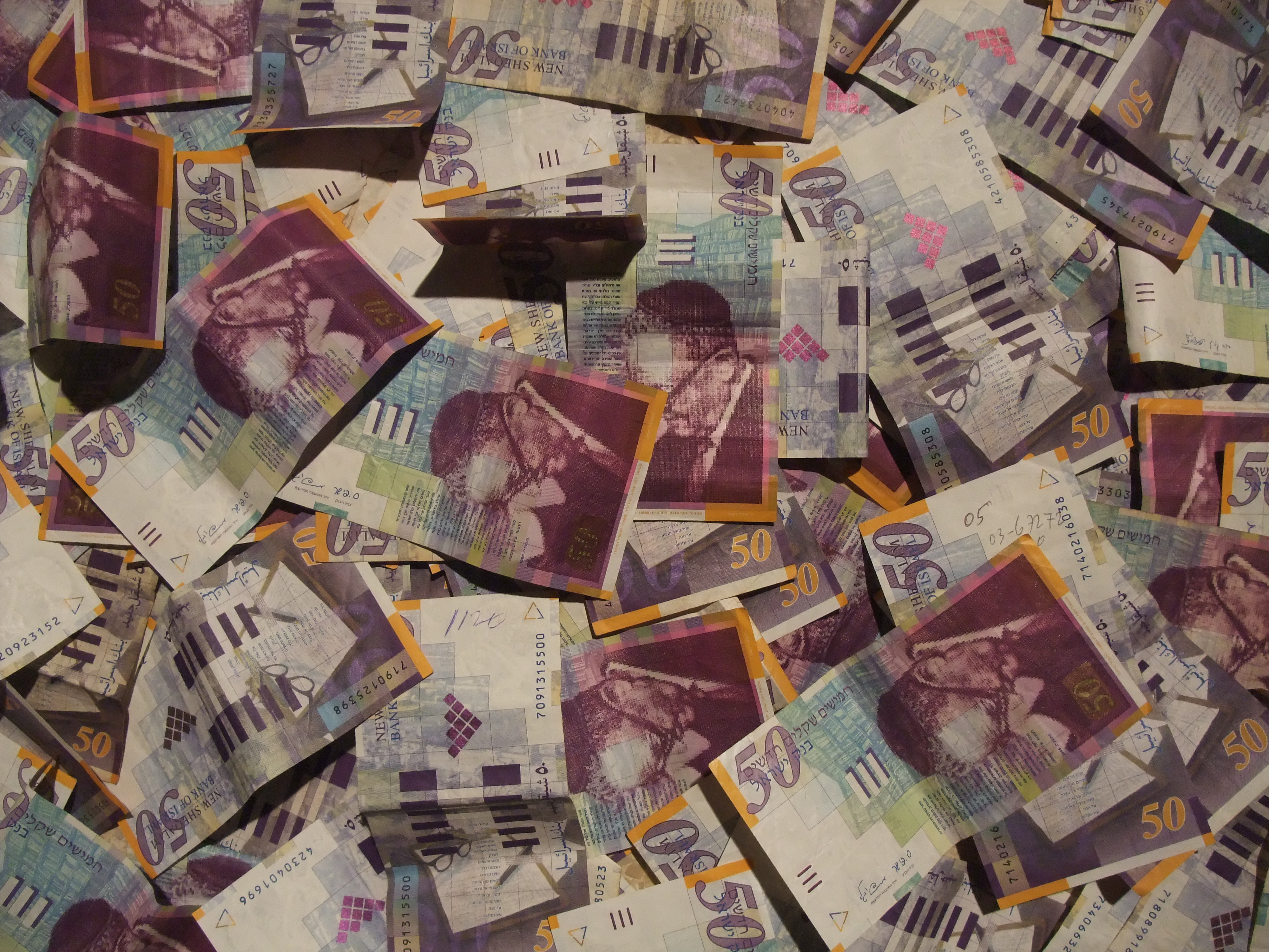 שטרות של 50 ש"ח